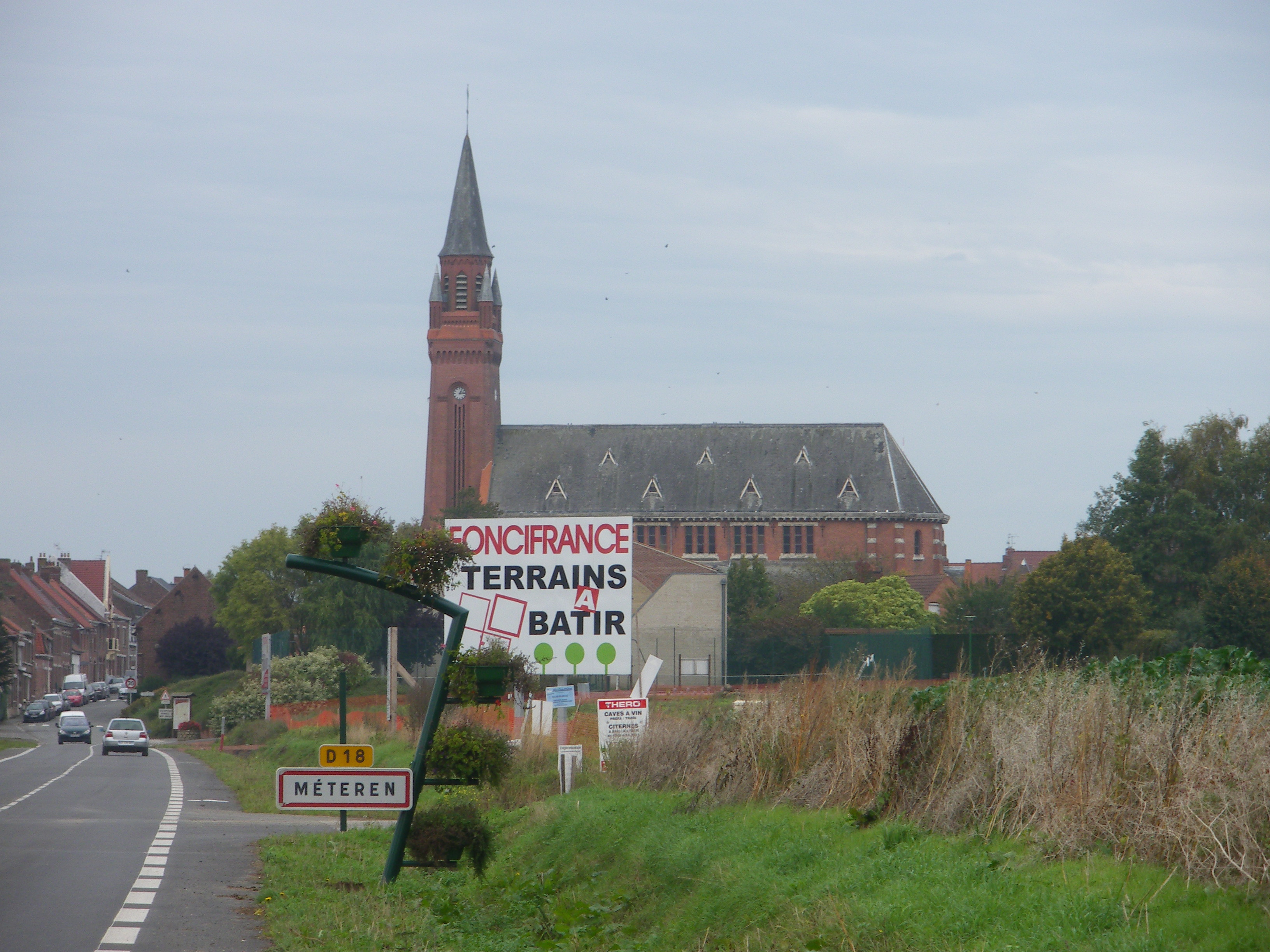 Vue du panneau d'entrée de la commune de Méteren. Au fond, se trouve l'église de la commune.